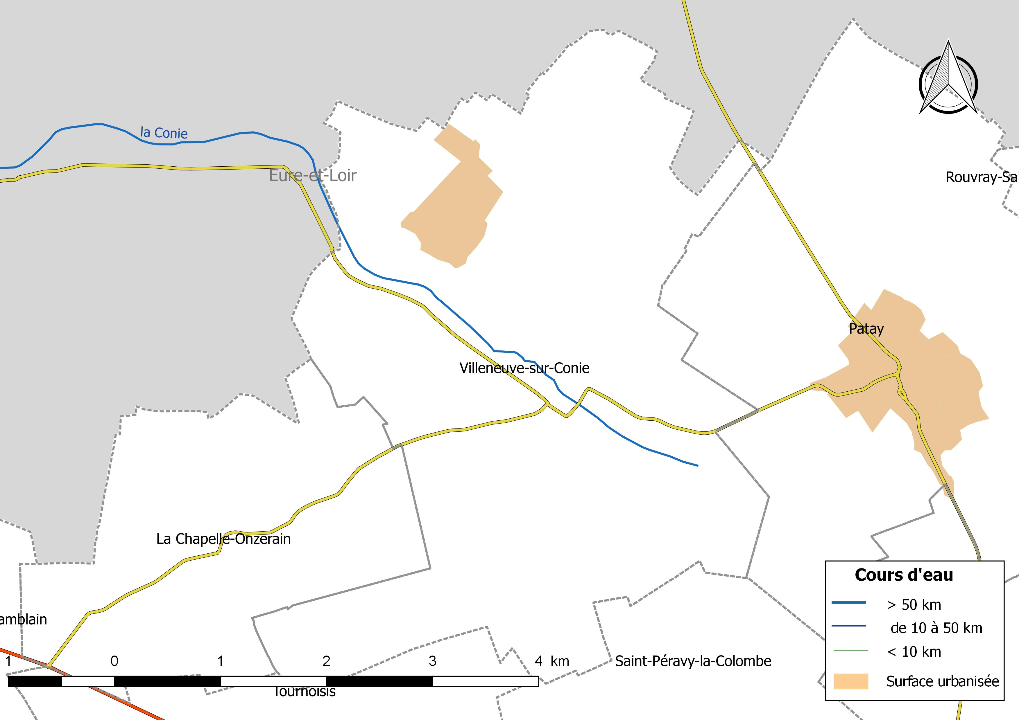 Carte du réseau hydrographique de la commune de Villeneuve-sur-Conie (France).